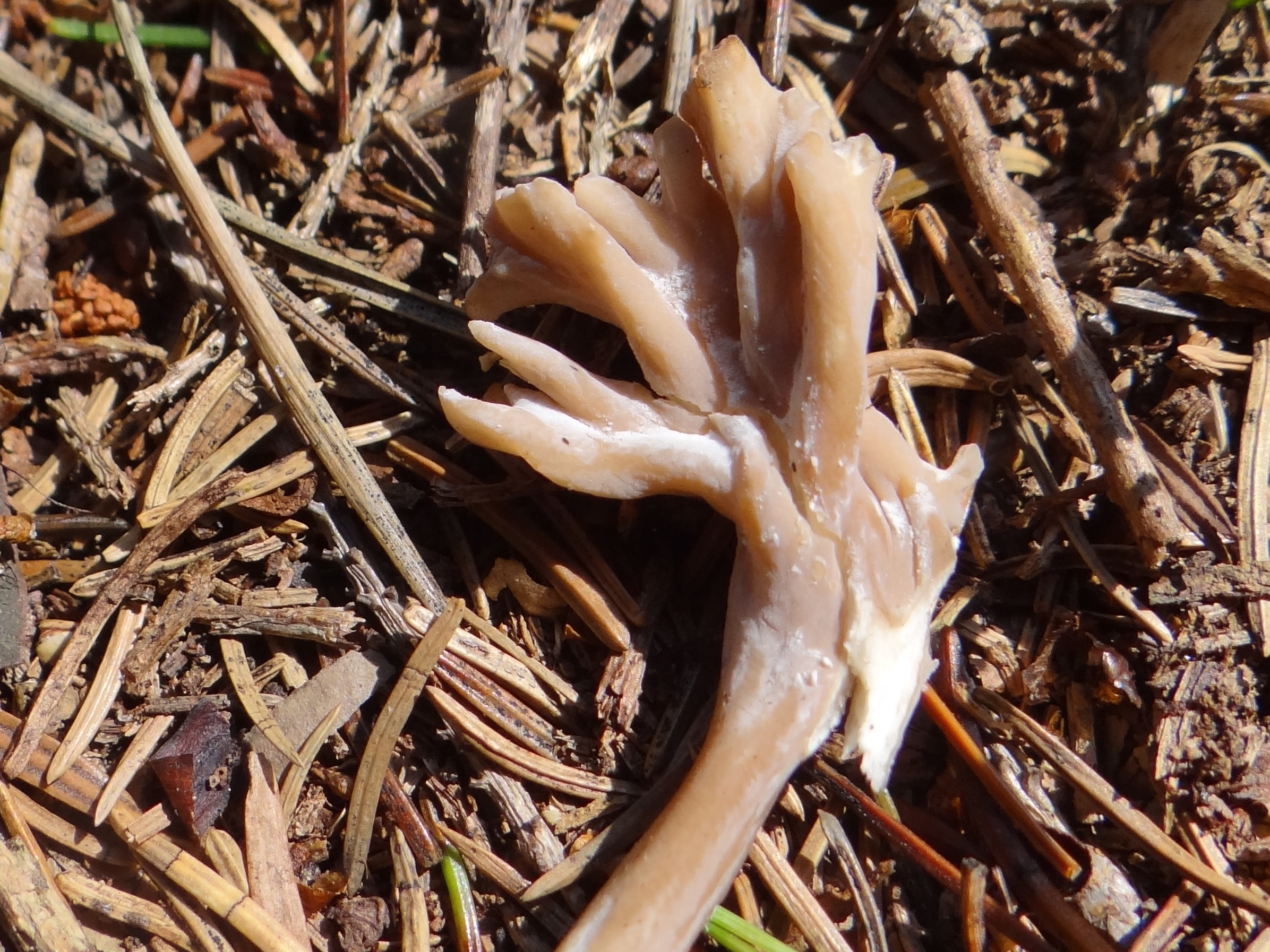 Thelephora palmata (location: Poland, Beskid Żywiecki, Skawica)